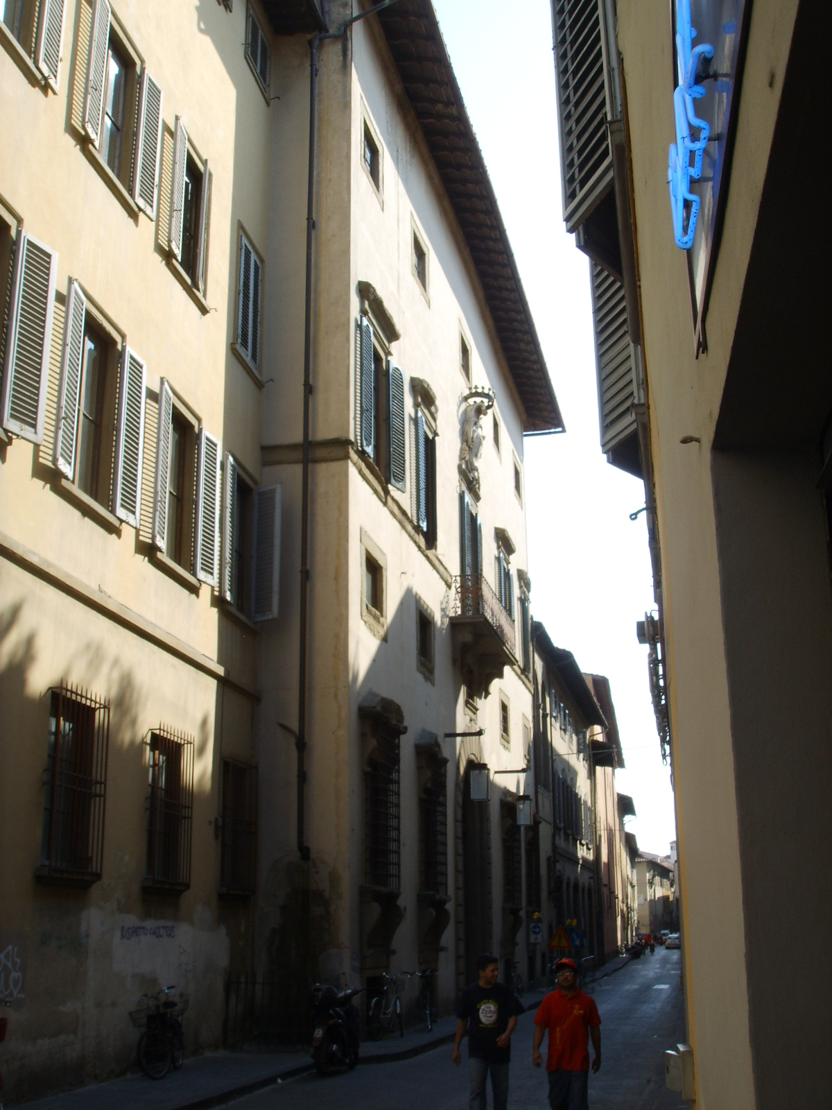 Palazzo_Panciatichi ximenes_da_sangallo in Florence